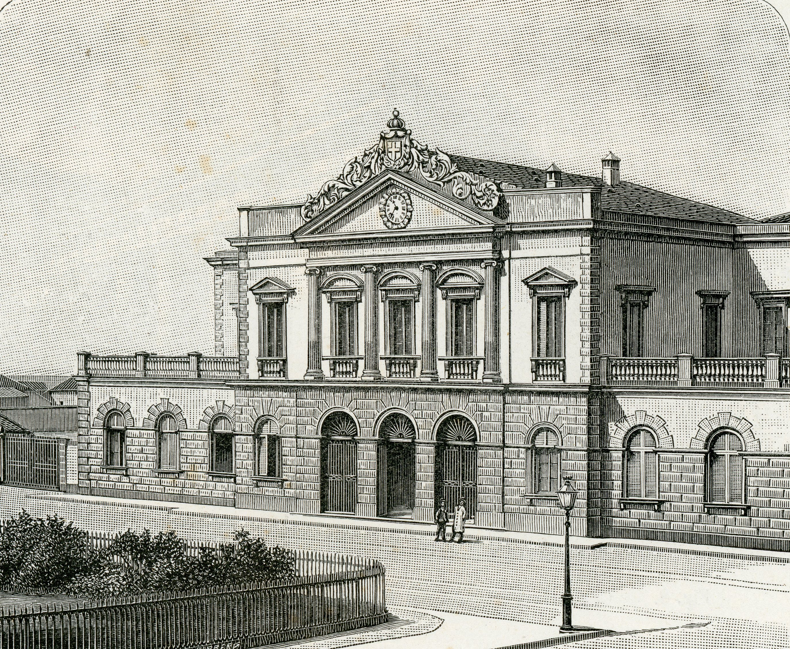 La stazione di Cagliari nel 1895, xilografia di Giuseppe Barberis.